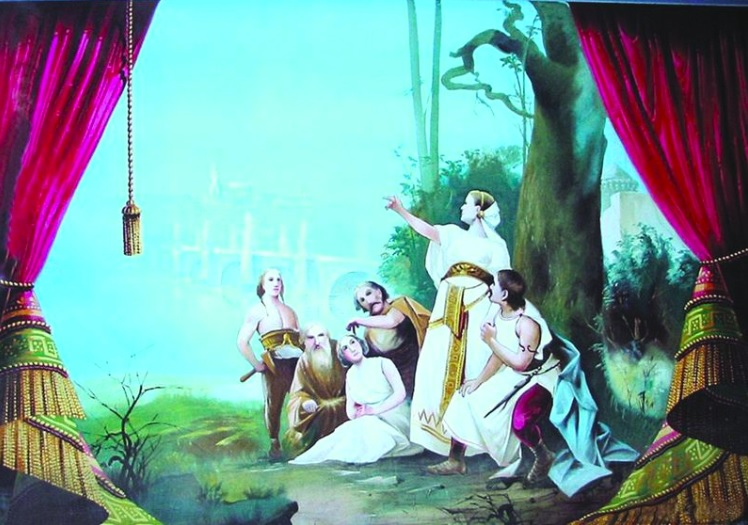 Buřany opona